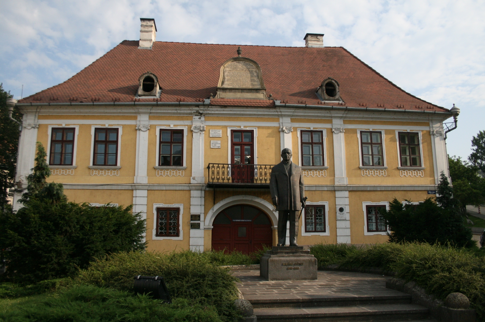 casa Teleki